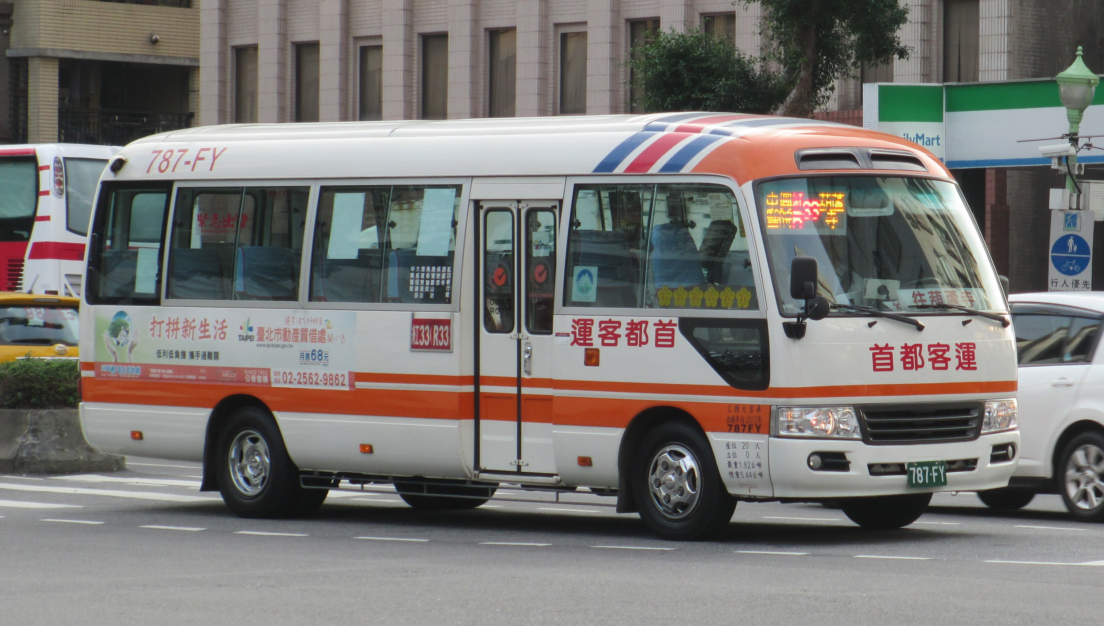 首都客運 2013 TOYOTA COASTER XZB50L-ZEMSYR 787-FY 紅33